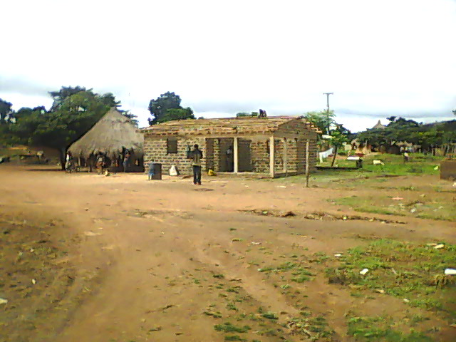 Construction d'un magasin à Gbogolo